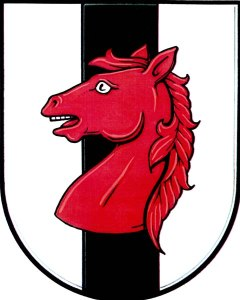 Česky: znak obce Skrbeň